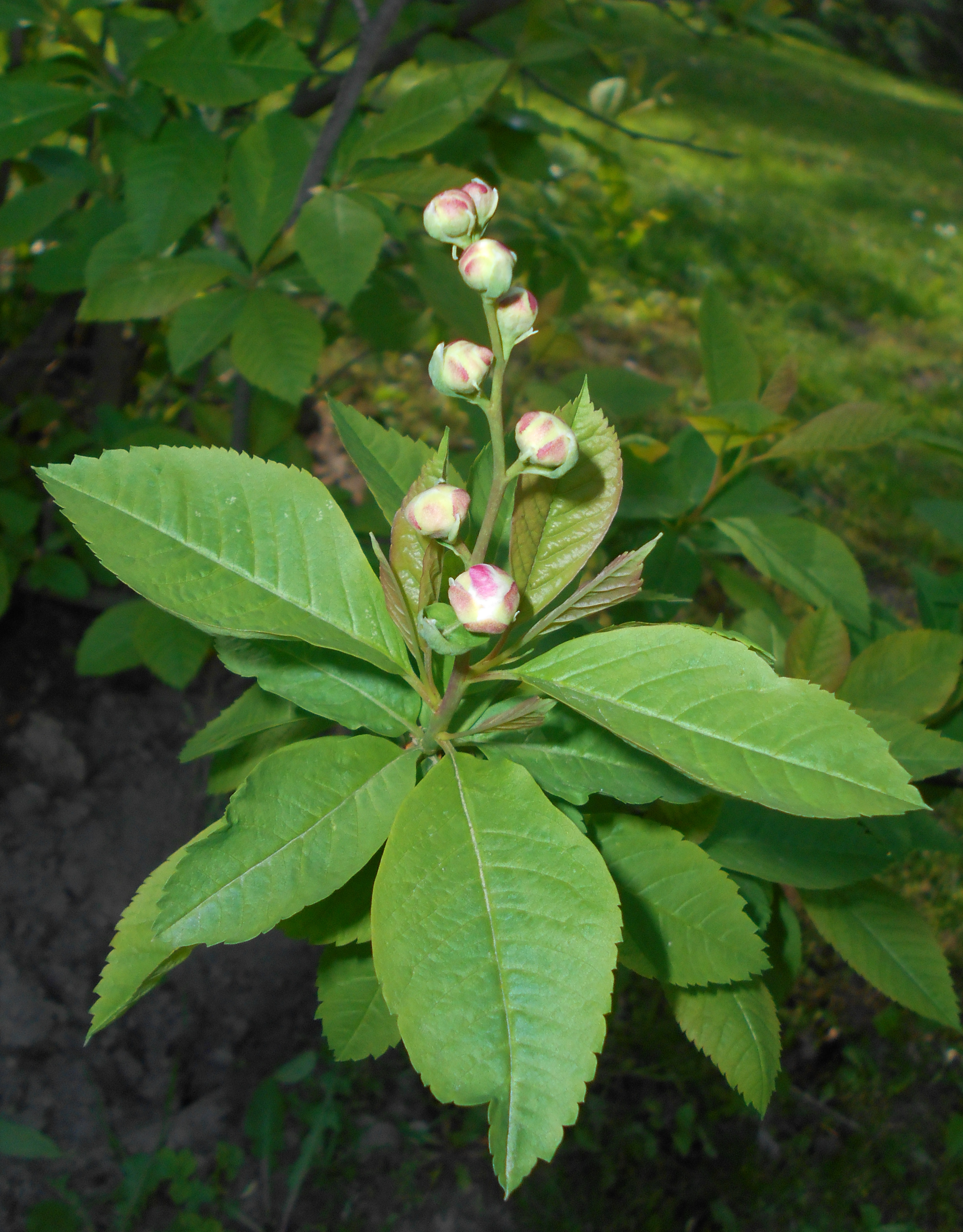 Obiela piłkowana (Exochorda racemosa subsp. serratifolia), Ogród Botaniczny UMCS w Lublinie.